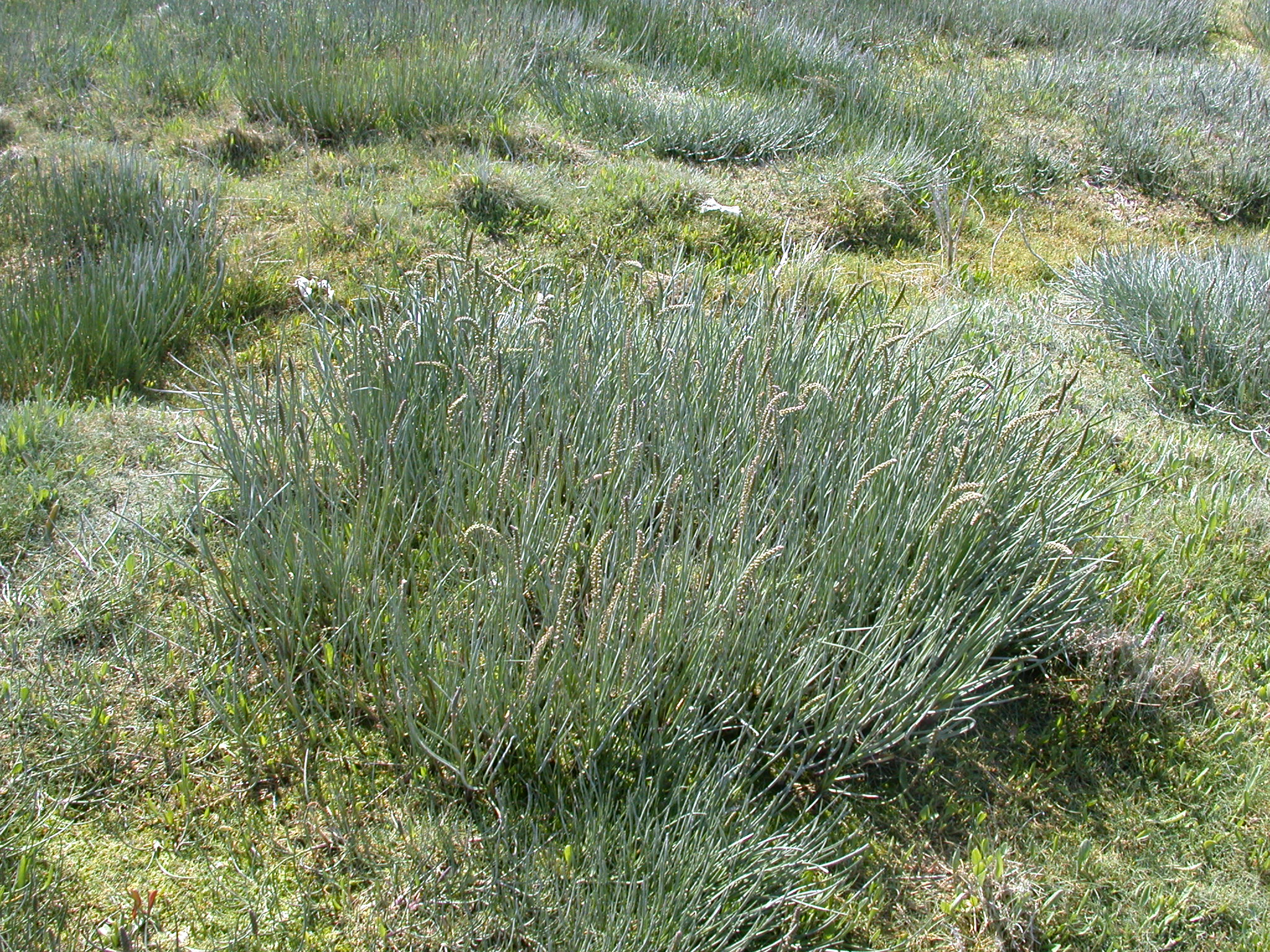 Triglochin maritima Baie d'Authie Nord (Somme), France